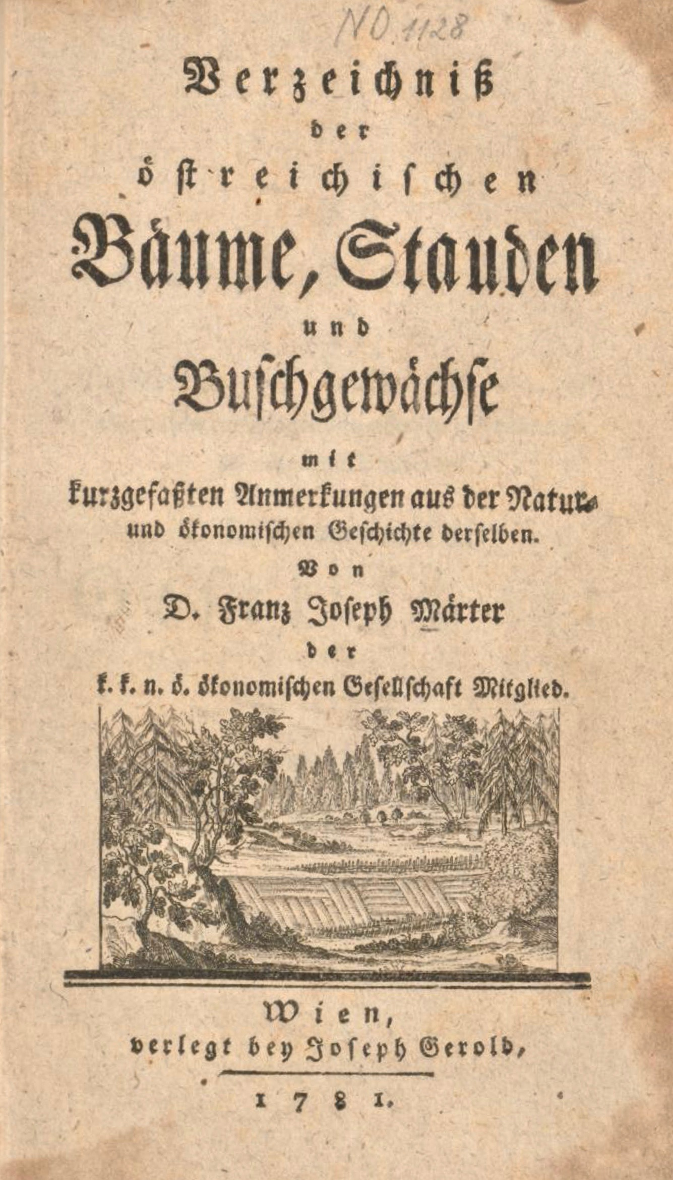 Franz Joseph Märter: Verzeichniß der östreichischen Bäume, Stauden und Buschgewächse mit kurzgefaßten Anmerkungen aus der Natur- und ökonomischen Geschichte derselben. Joseph Gerold, Wien 1781 (Titel).